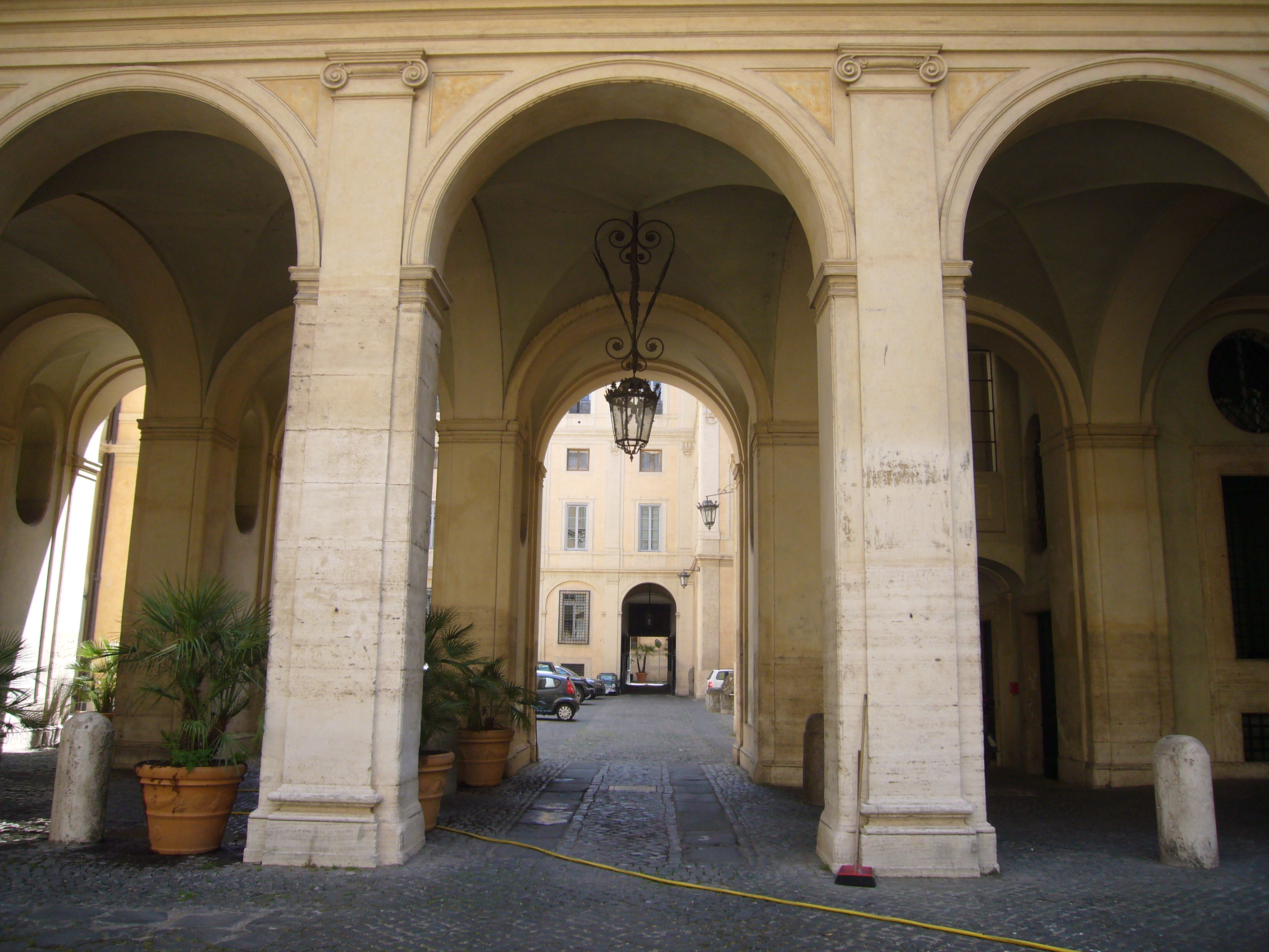 Roma, palazzo Altieri: tra i due cortili